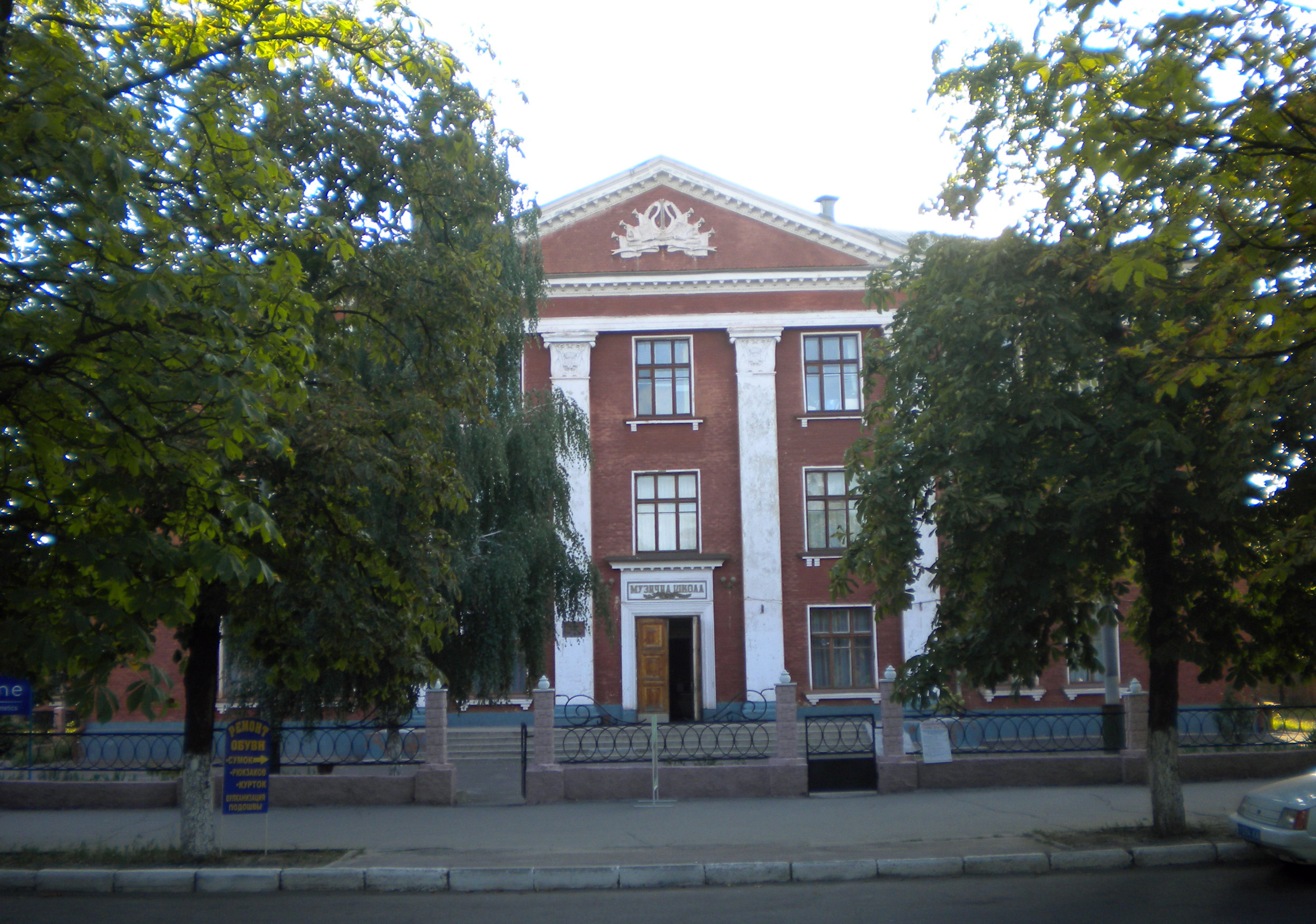 Музична школа № 1 на центральній площі міста Олександрія